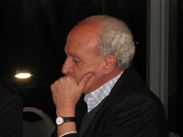 Miguel Ángel Campodónico en la presentación que hice del libro "París Tangó", de Juan Carlos Legido, en el Museo Zorrilla